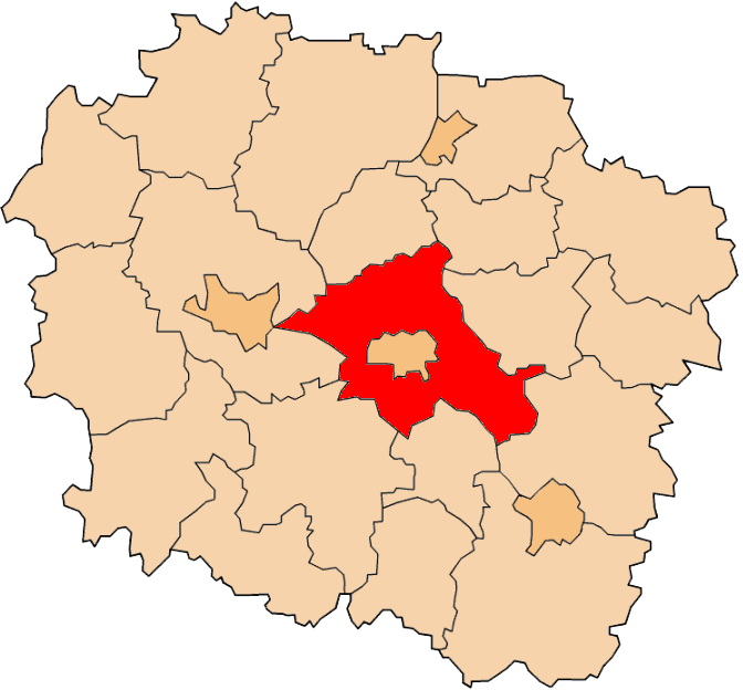 Powiat toruński na mapie województwa kujawsko-pomorskiego.